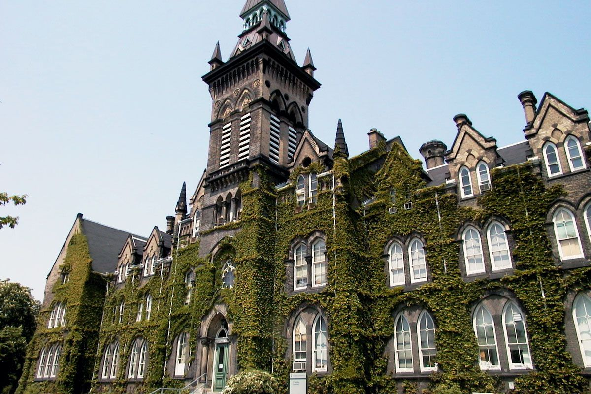 One Spadina Cres